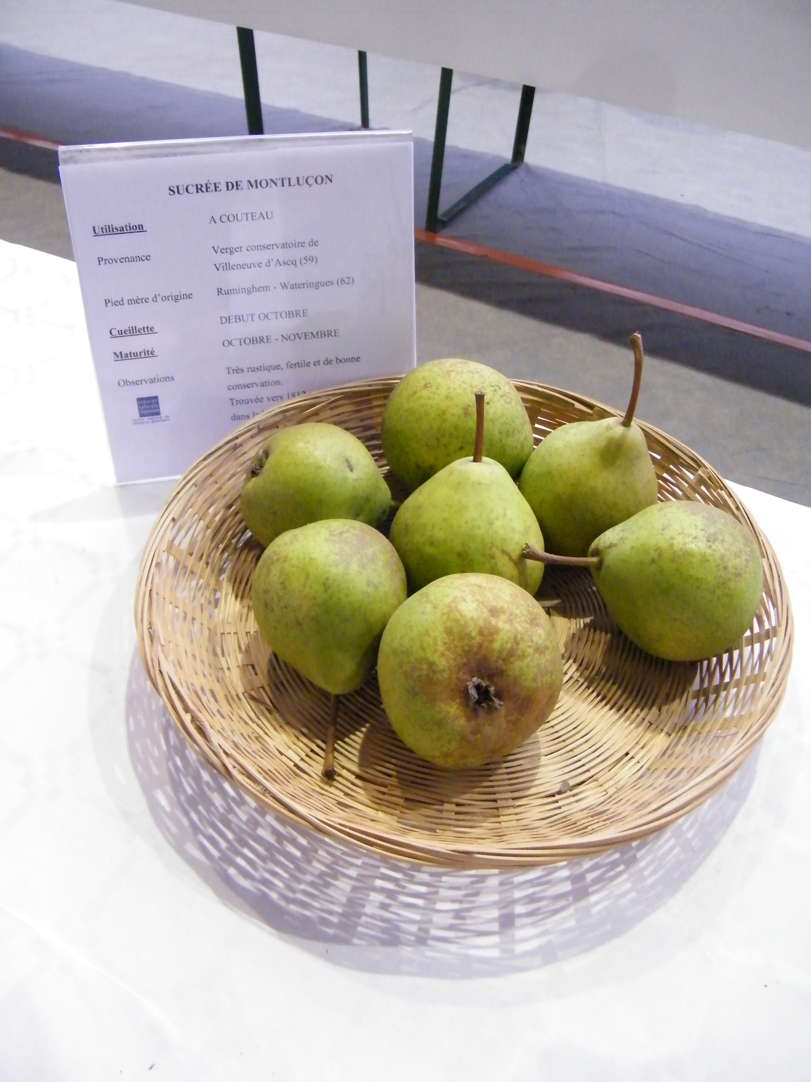 Ailly-le-Haut-Clocher, Somme, Fr,Apple festival 03et04-11-2018 (57)